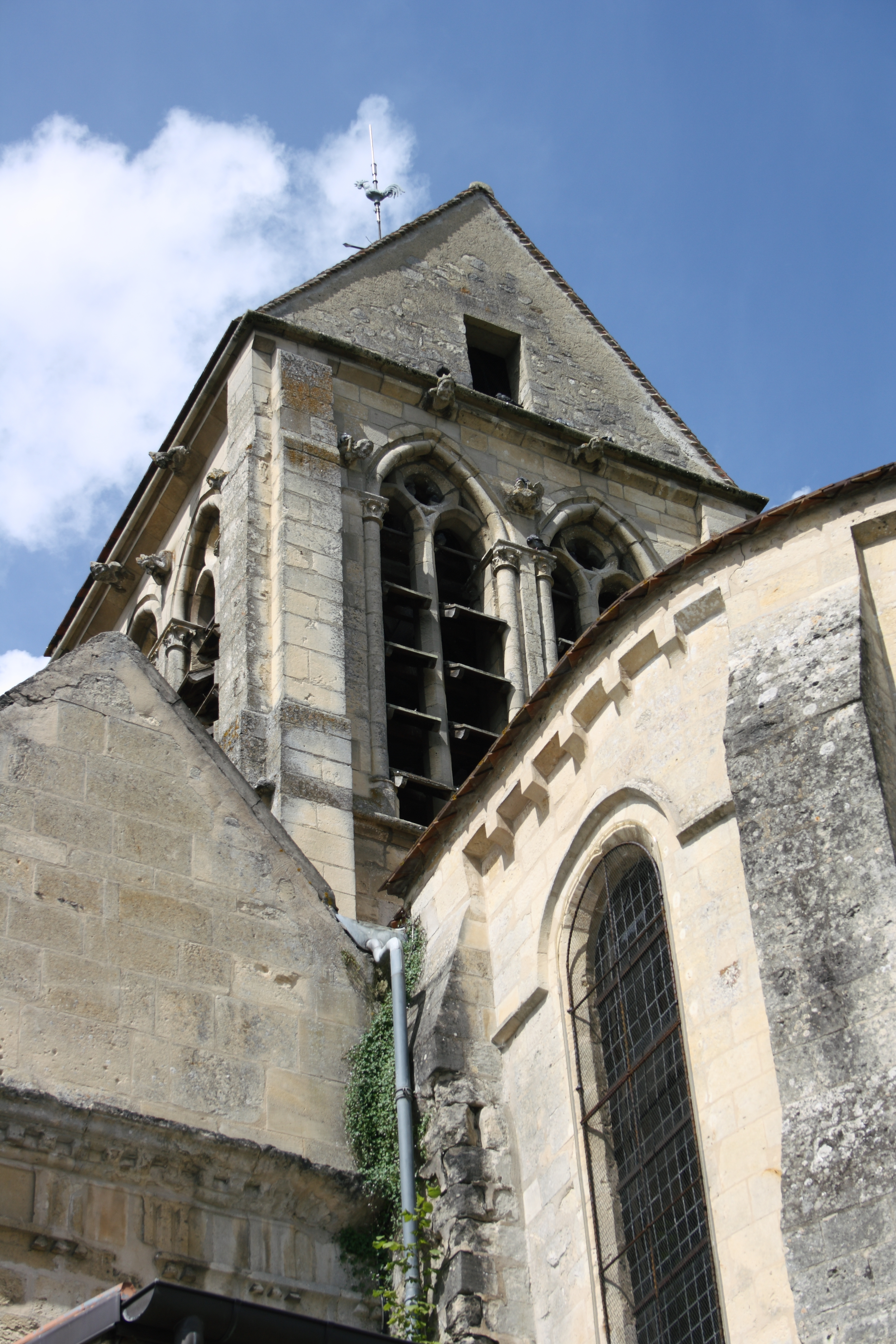 Katholische Kirche Saint-Denis in Jouy-le-Comte, einem Ortsteil von Parmain (Département Val-d’Oise) in der Region Île-de-France (Frankreich)